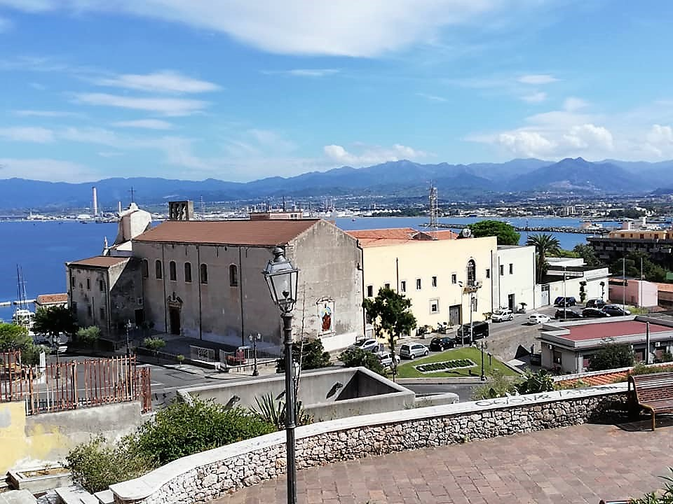 Complesso dell'Ordine dei Minimi: Santuario di San Francesco di Paola, convento (struttura adibita a caserma dei Carabinieri).